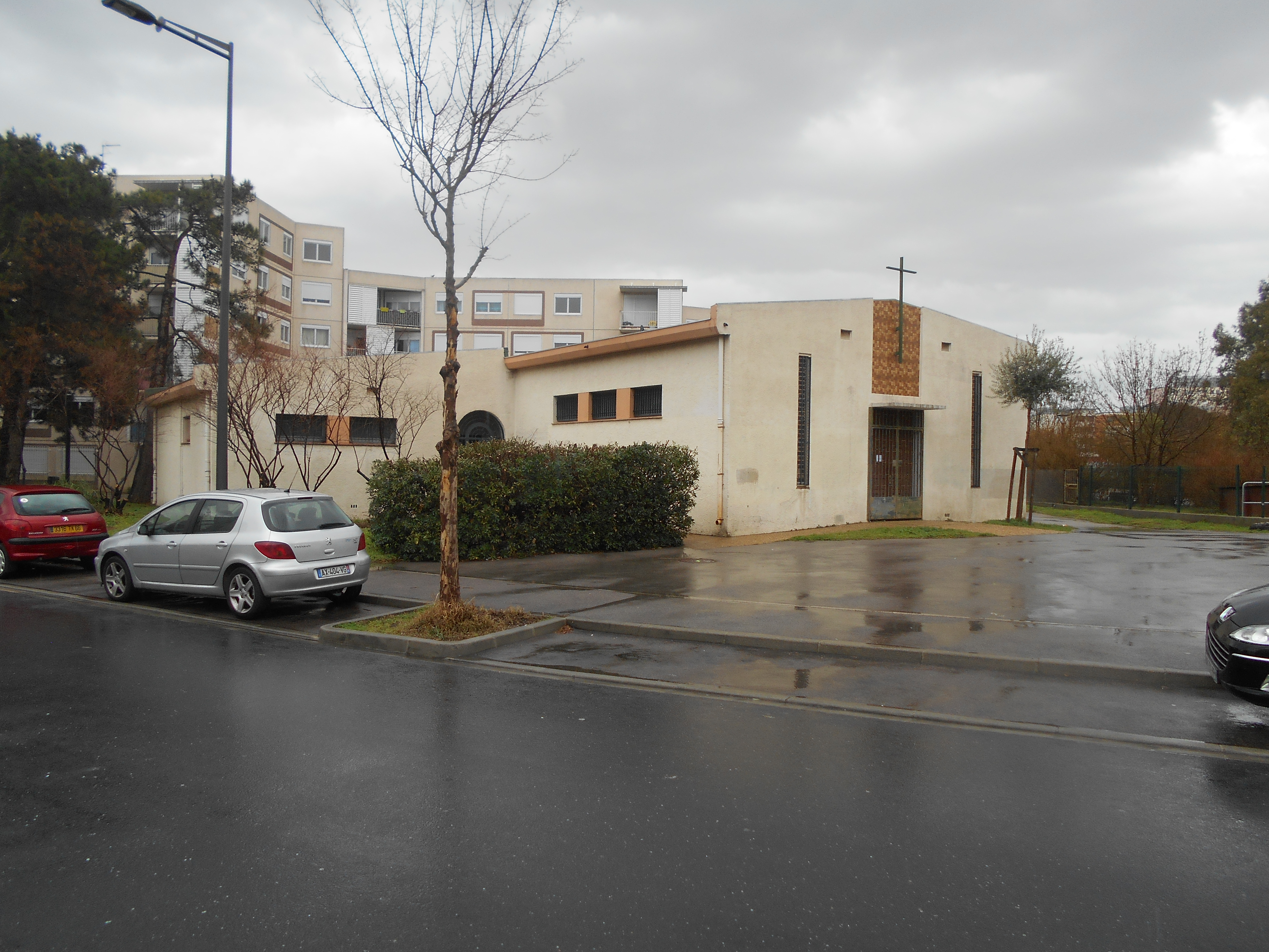 La parròquia ortodoxa romanesa de Perpinyà